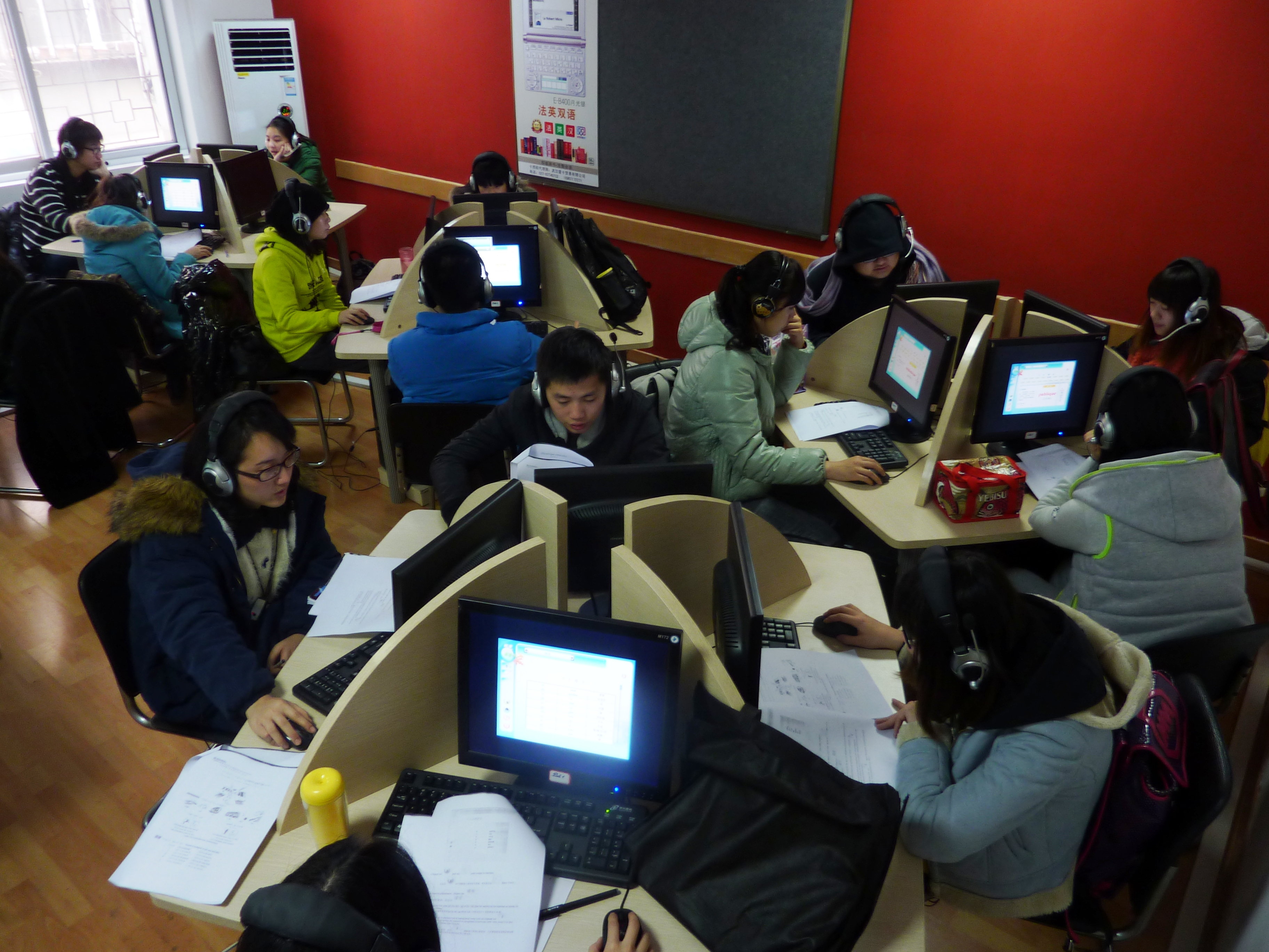 Atelier de phonétique corrective à l'Alliance française de Wuhan (